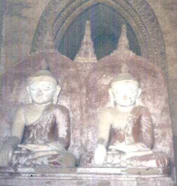 Будды в паганских храмах